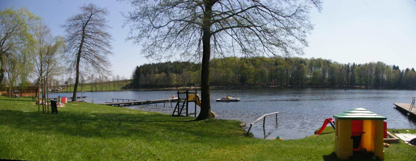 Holzöstersee im Frühjahr